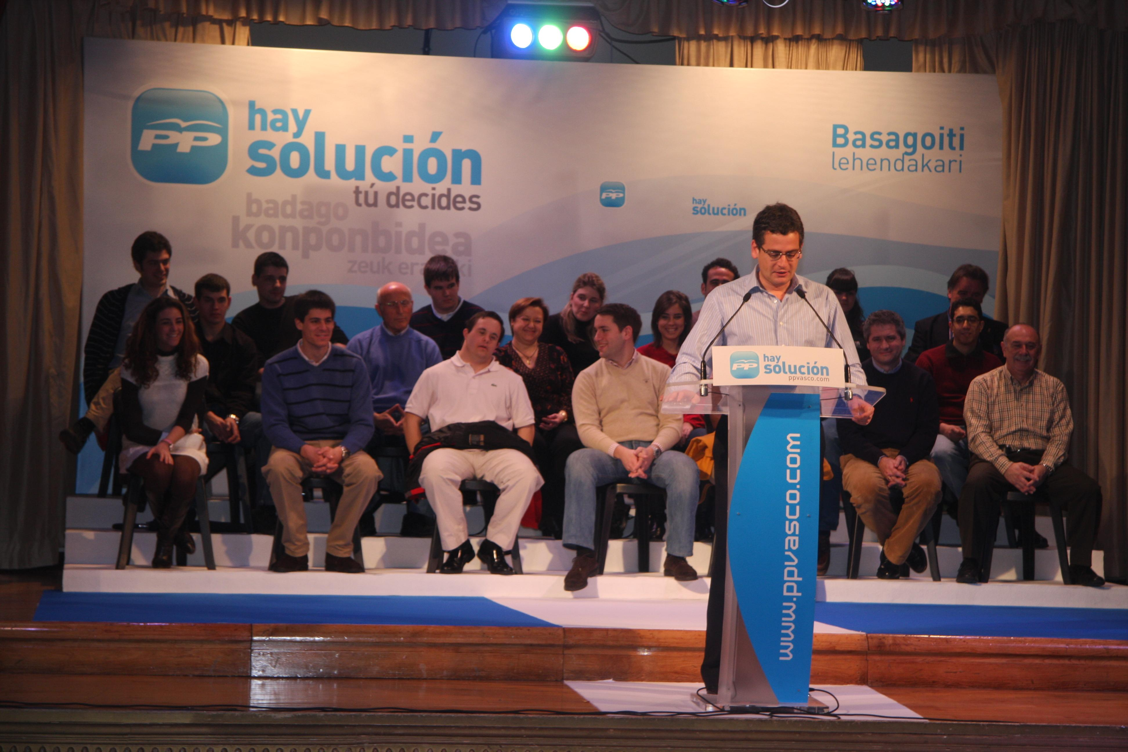 Antonio Basagoiti en un mitin en Guecho durante la campaña de las elecciones autonómicas vascas de 2009 (8 de febrero).